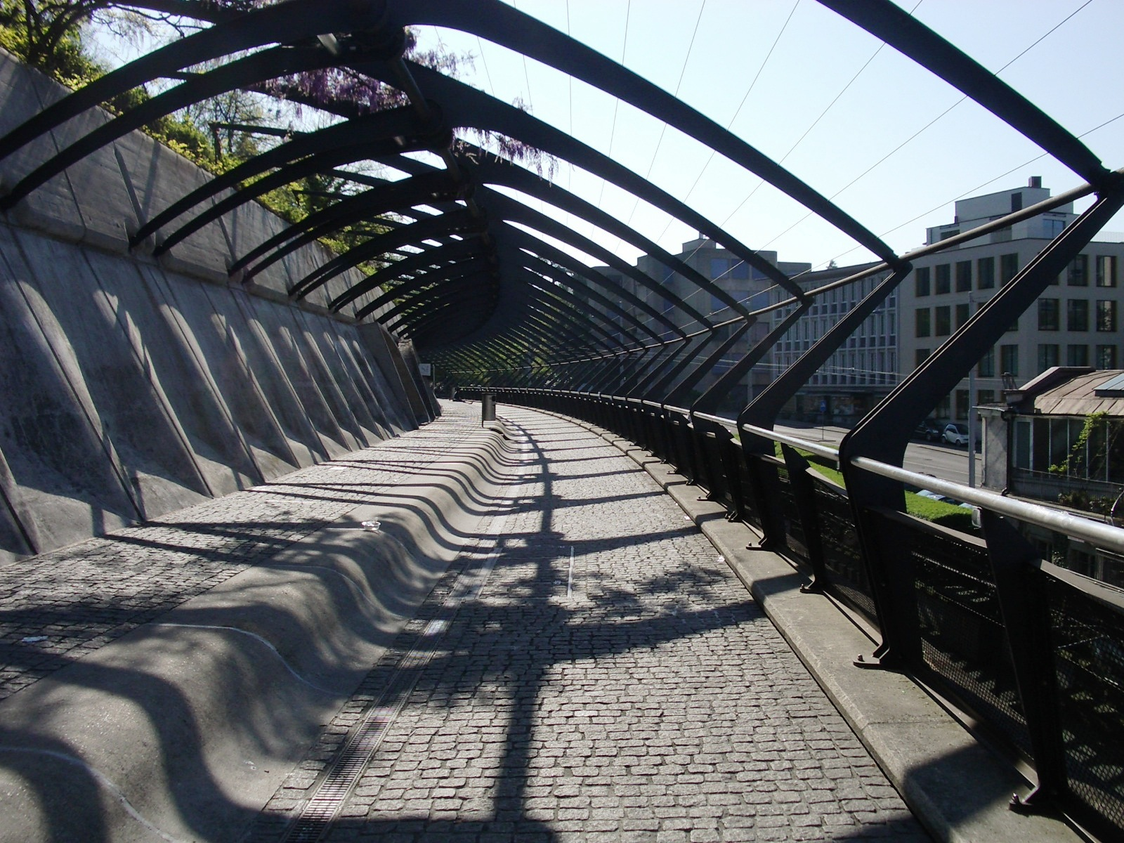 Zurich, Switzerland self-made, April 2007